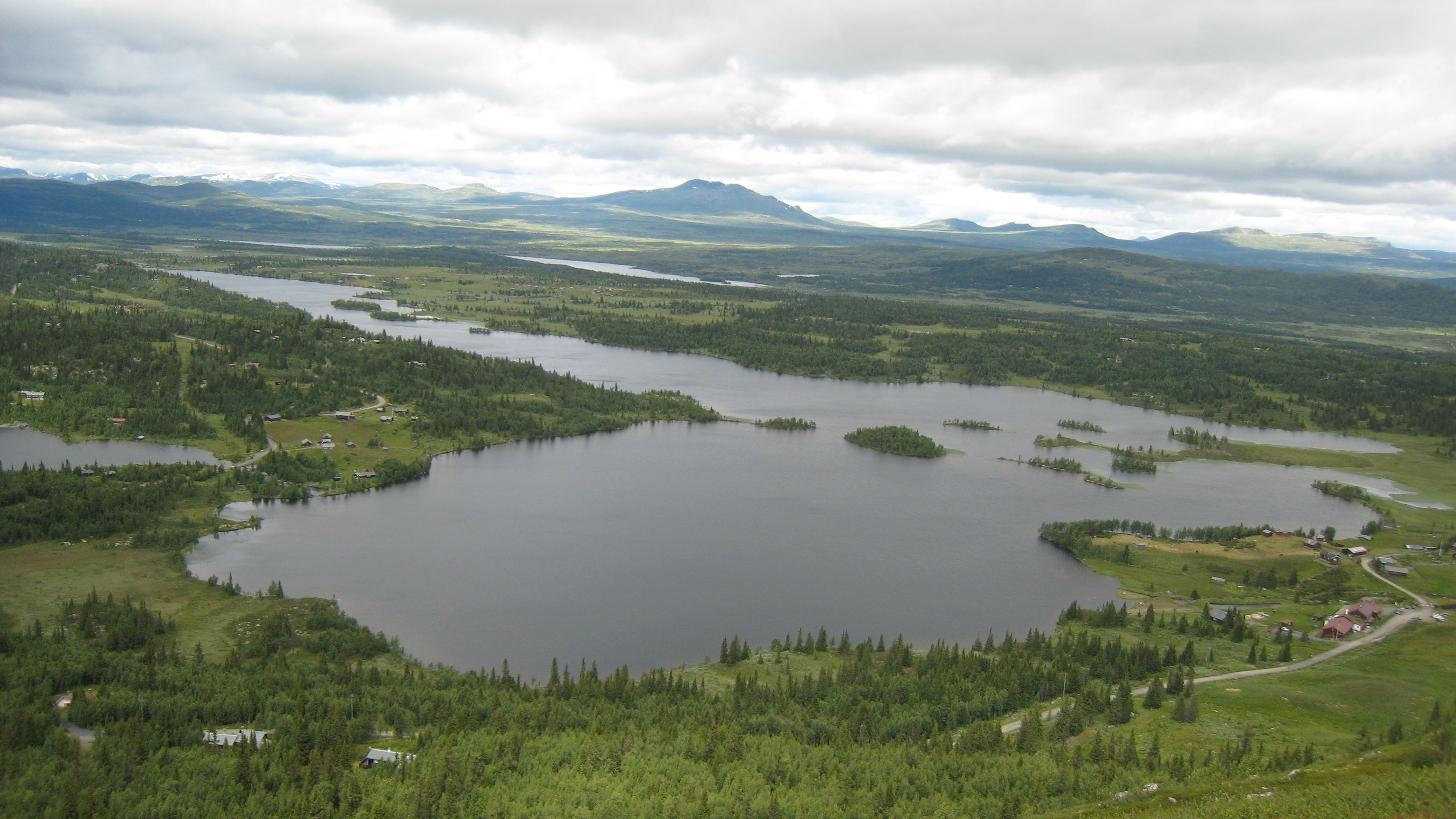 Vangsjøen, Valdres, Oppland, Norway